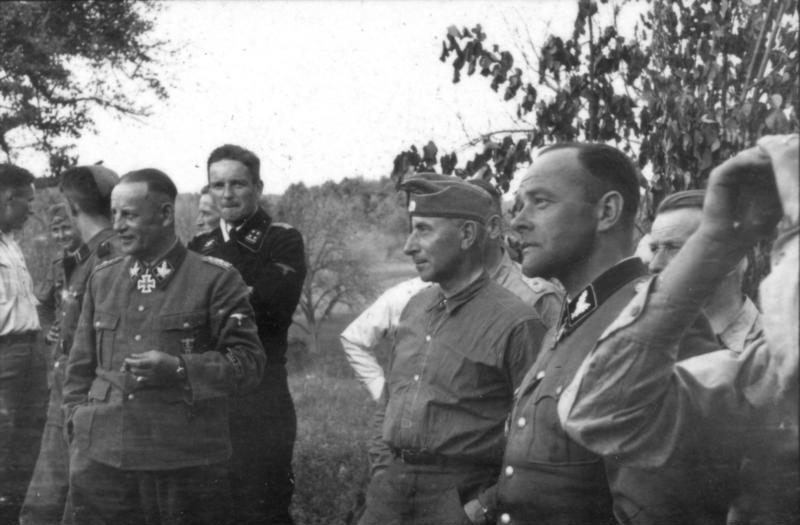 v.links Krüger, v. Reitzenstein, Hauser, Ostendorf